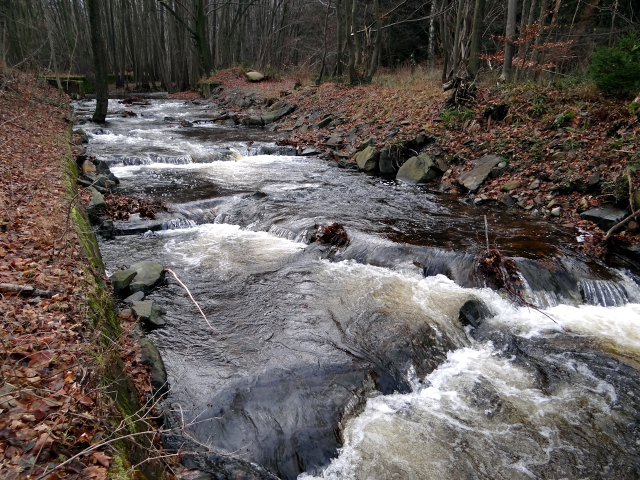 Sohlgleite der Ecker beim ehemaligen Einstau am Abschlag in die Stimmecke.